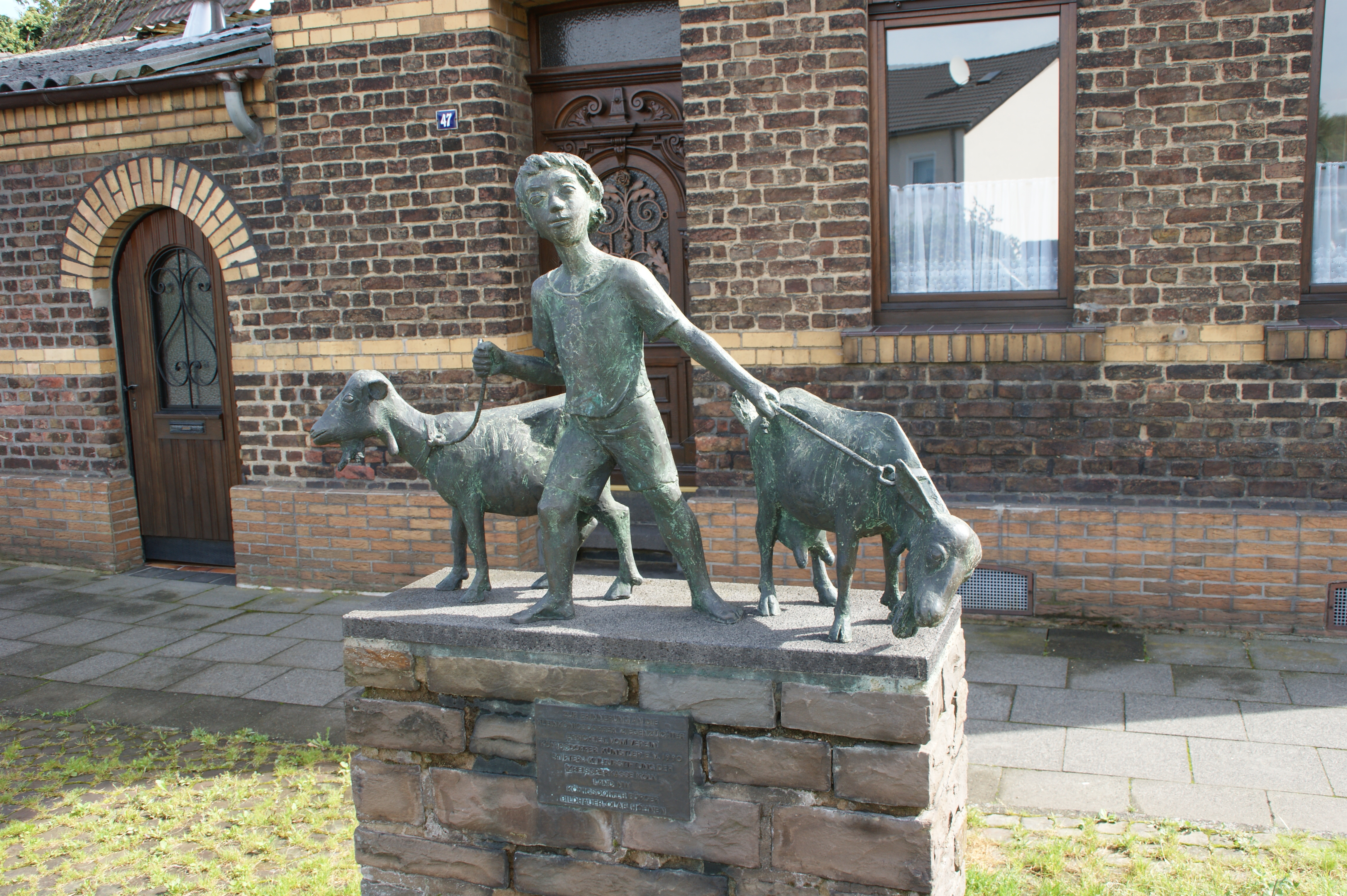 Ziegendenkmal von Olaf Höhnen in Königsdorf, 1990